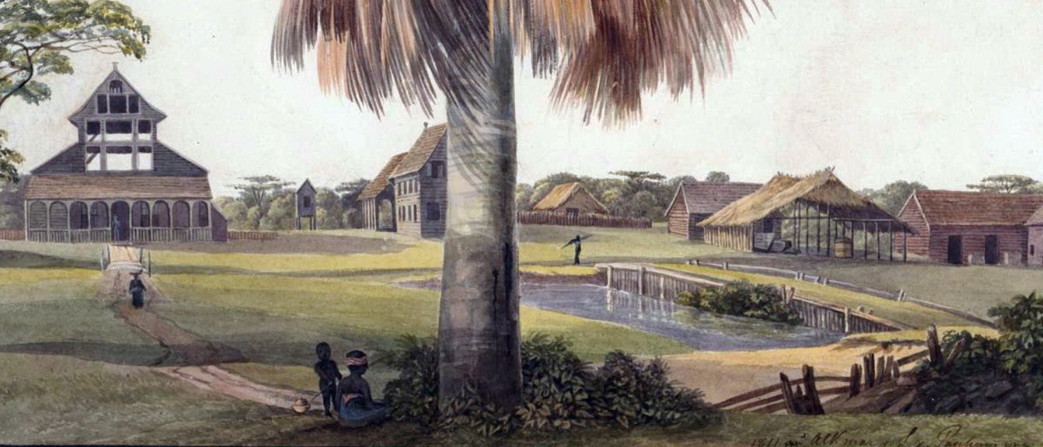 Detail van een aquarel van de plantage Alkmaar in het Commewijnedistrict in Suriname, geschilderd door Louise van Panhuys tijdens haar verblijf in Suriname als echtgenote van een plantagehouder (1811-1816). Collectie Universiteitsbibliotheek Frankfurt am Main.